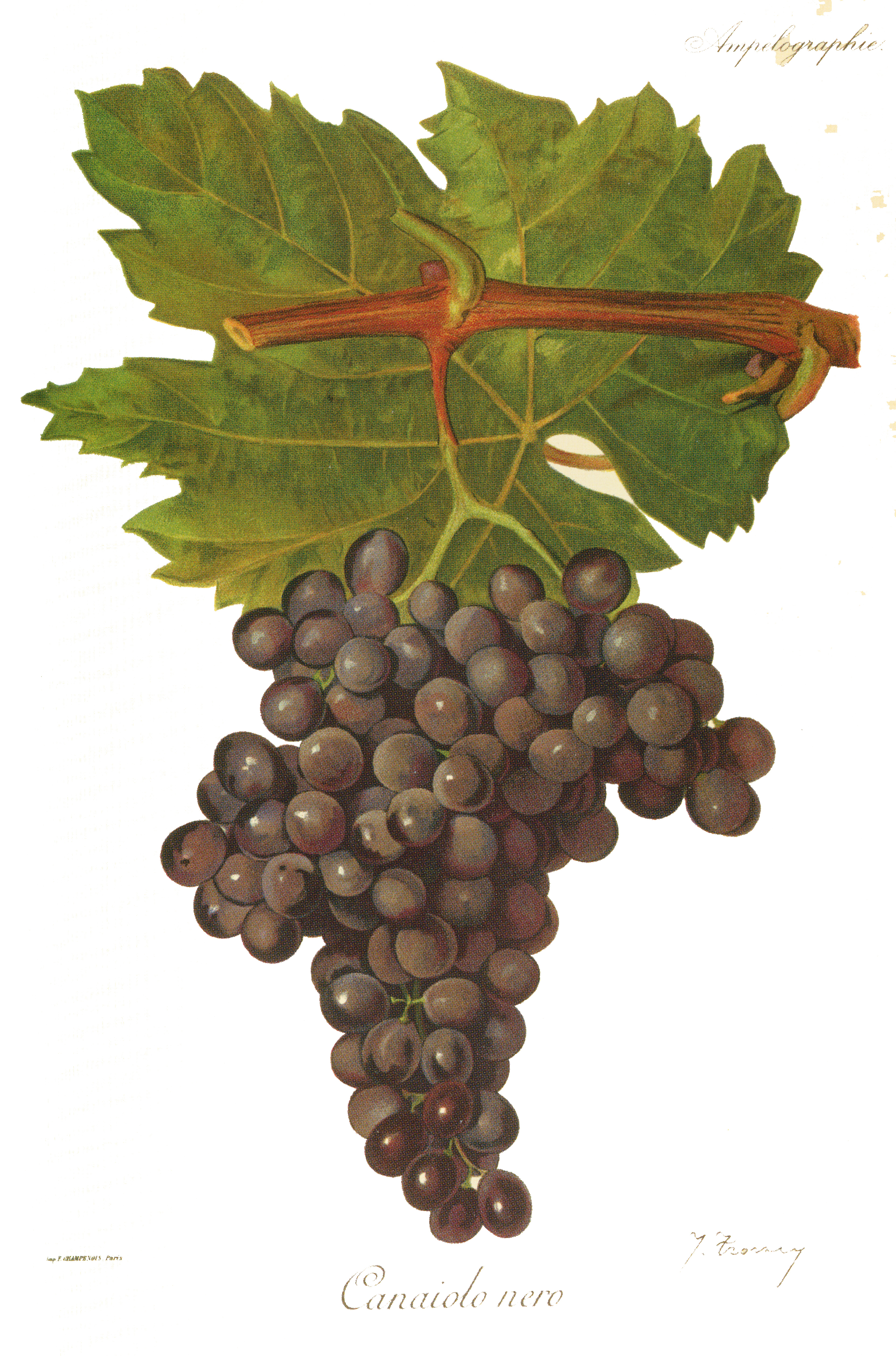 Canaiolo nero w L'Ampélographie Viali i Vermorela (1901-1910)